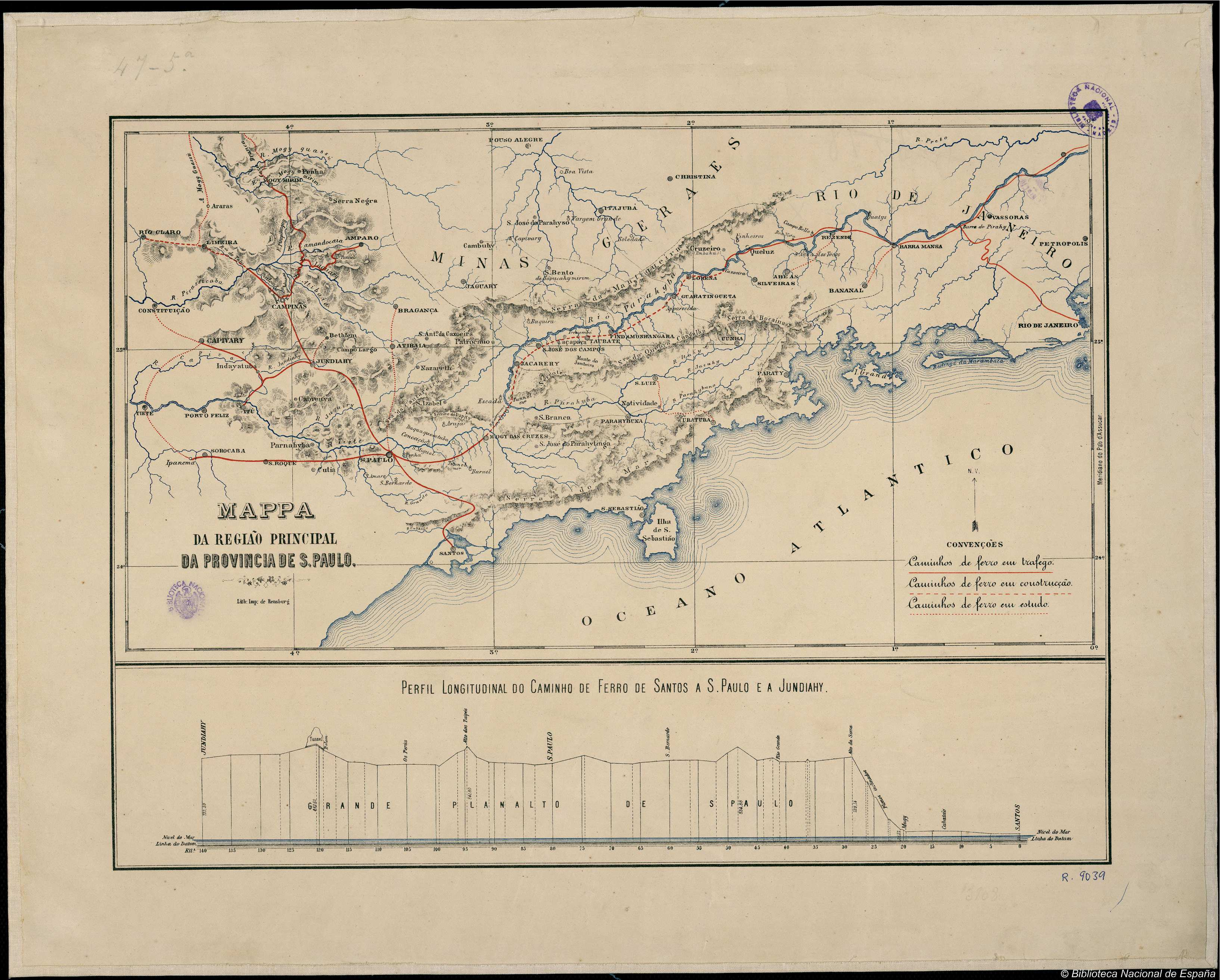 "Mappa da Região Principal da Provincia de S. Paulo"